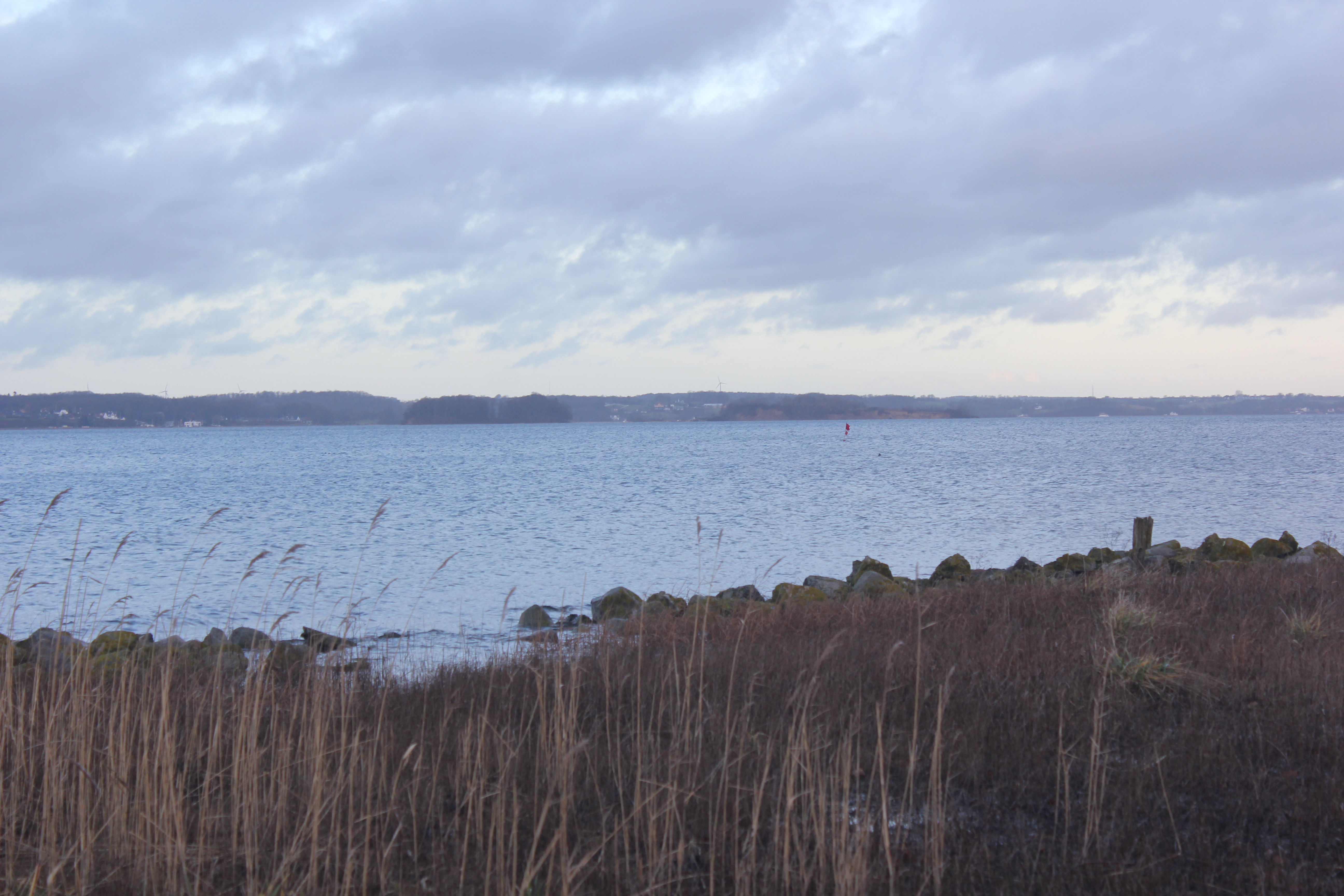 Blick vom Strandbad Solitüde rüber zu den Ochseninseln, Bild 02